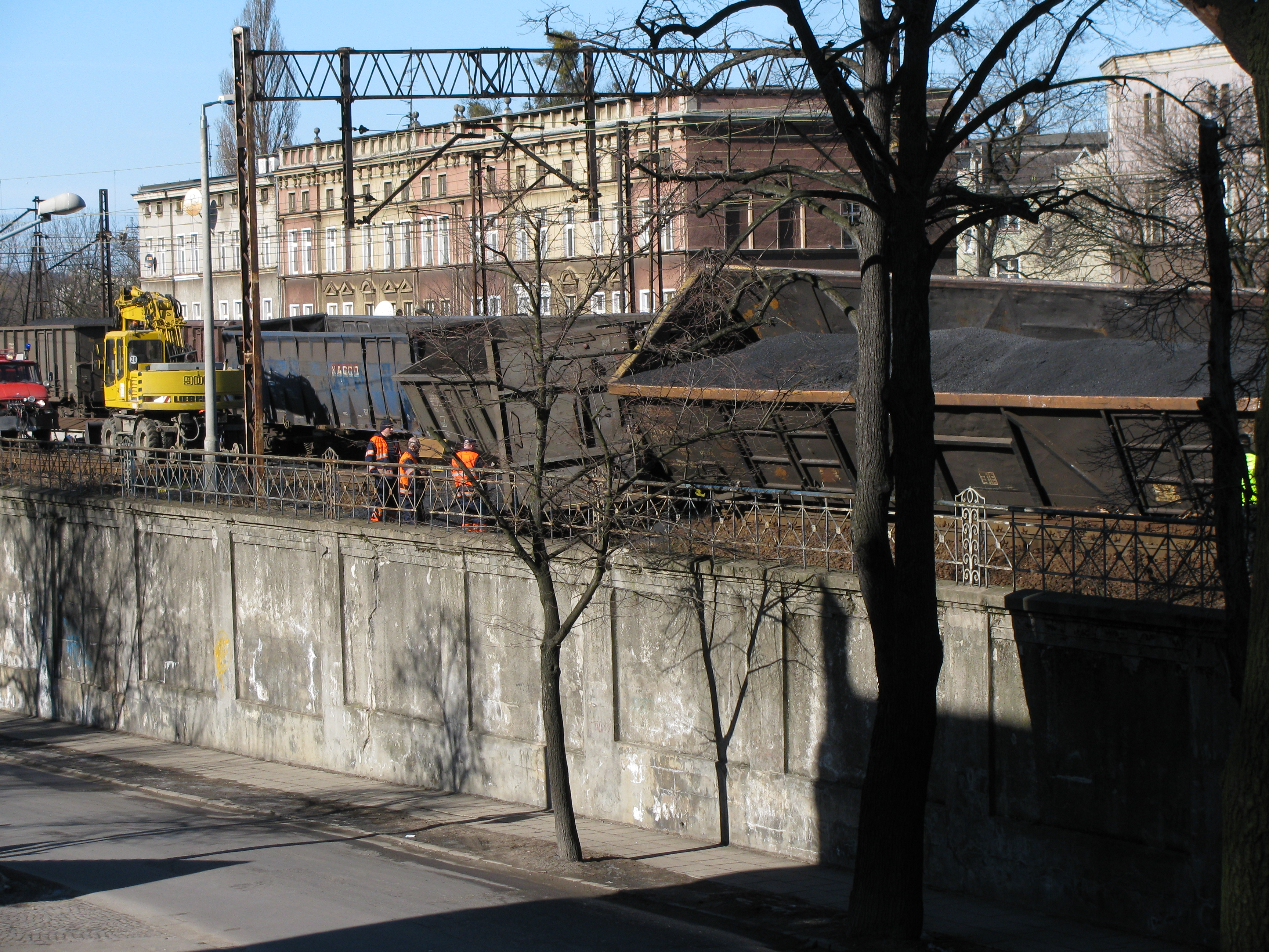 Wykolejony pociąg towarowy w Gdańsku Wrzeszczu, sfotografowany 7 marca 2011. Wykolejenie nastąpiło wieczorem, 6 marca 2011. Bez ofiar.